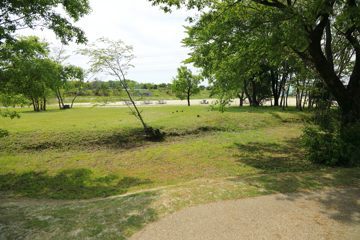 西大久手古墳（名古屋市守山区上志段味、2019年（令和元年）5月）